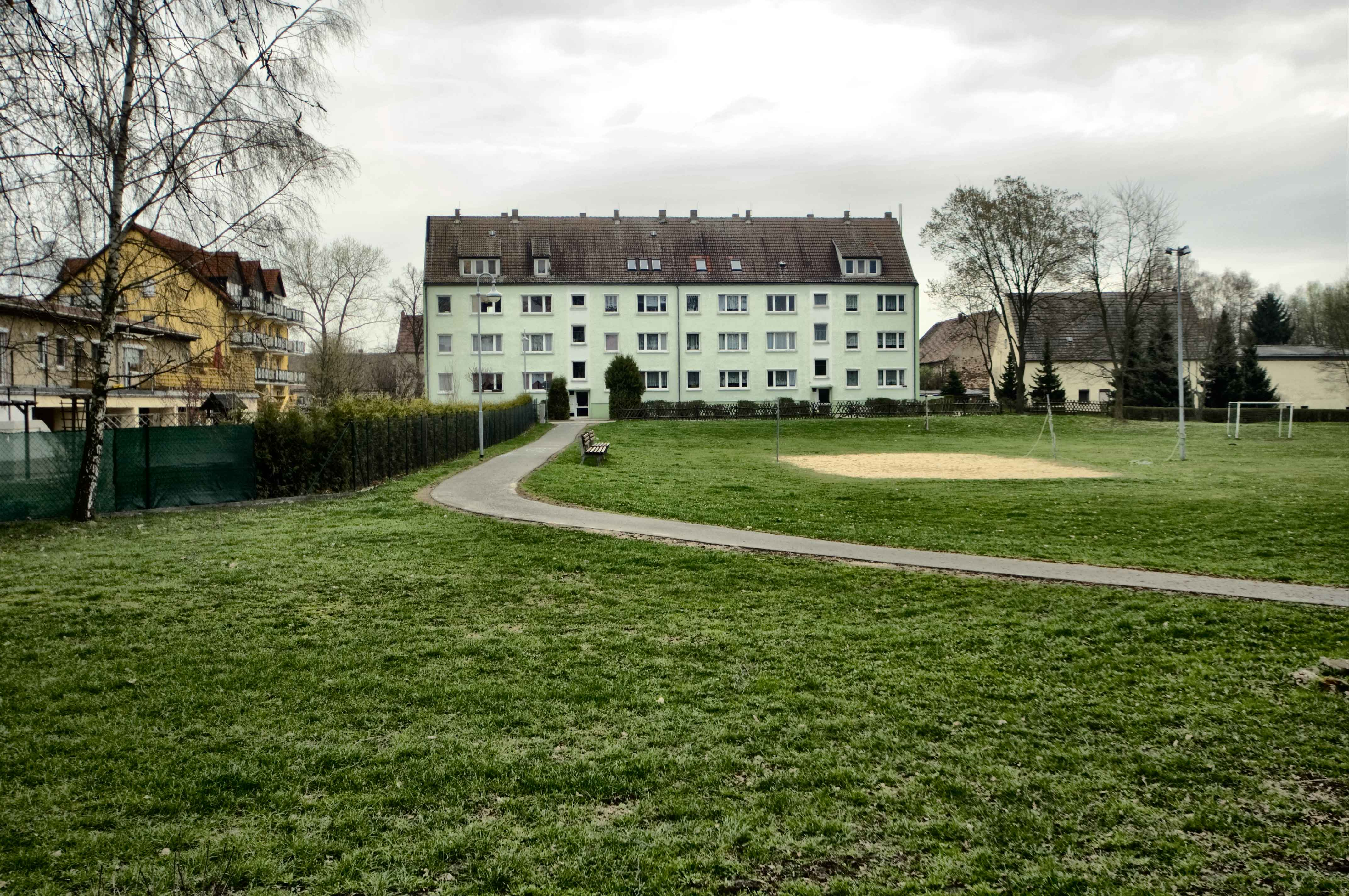 An der Stelle des ehemaligen Rittergutes Kötitz wurden Plattenbauten errichtet - Blick aus Richtung Dorf auf die ehemalige Gartenfassade in Calbitz bei Wermsdorf in Sachsen